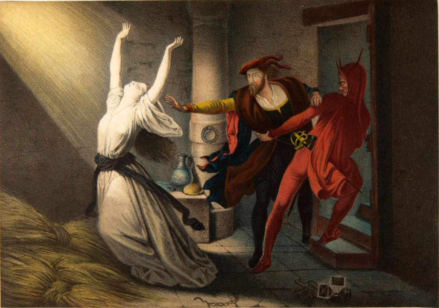 Faust und Mephisto im Kerker kolorierte Lithographie von Joseph Fay (Illustrierte Textstelle: Faust - Der Tragödie erster Teil, Kerker), Paris 1846